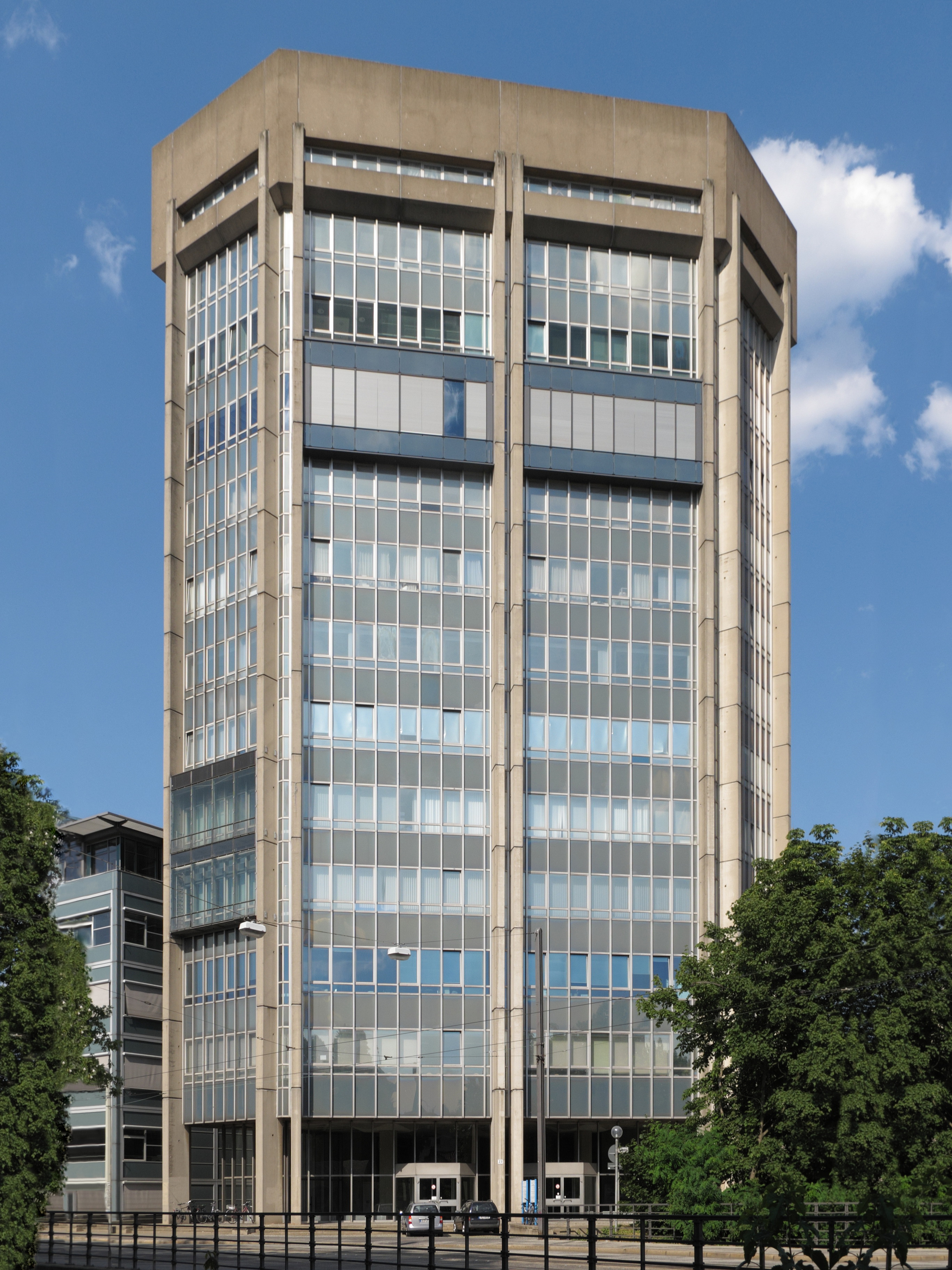 Das Architektur-Hochhaus der TU-Braunschweig in der Mühlenpfordtstraße 23. Baujahr: 1976